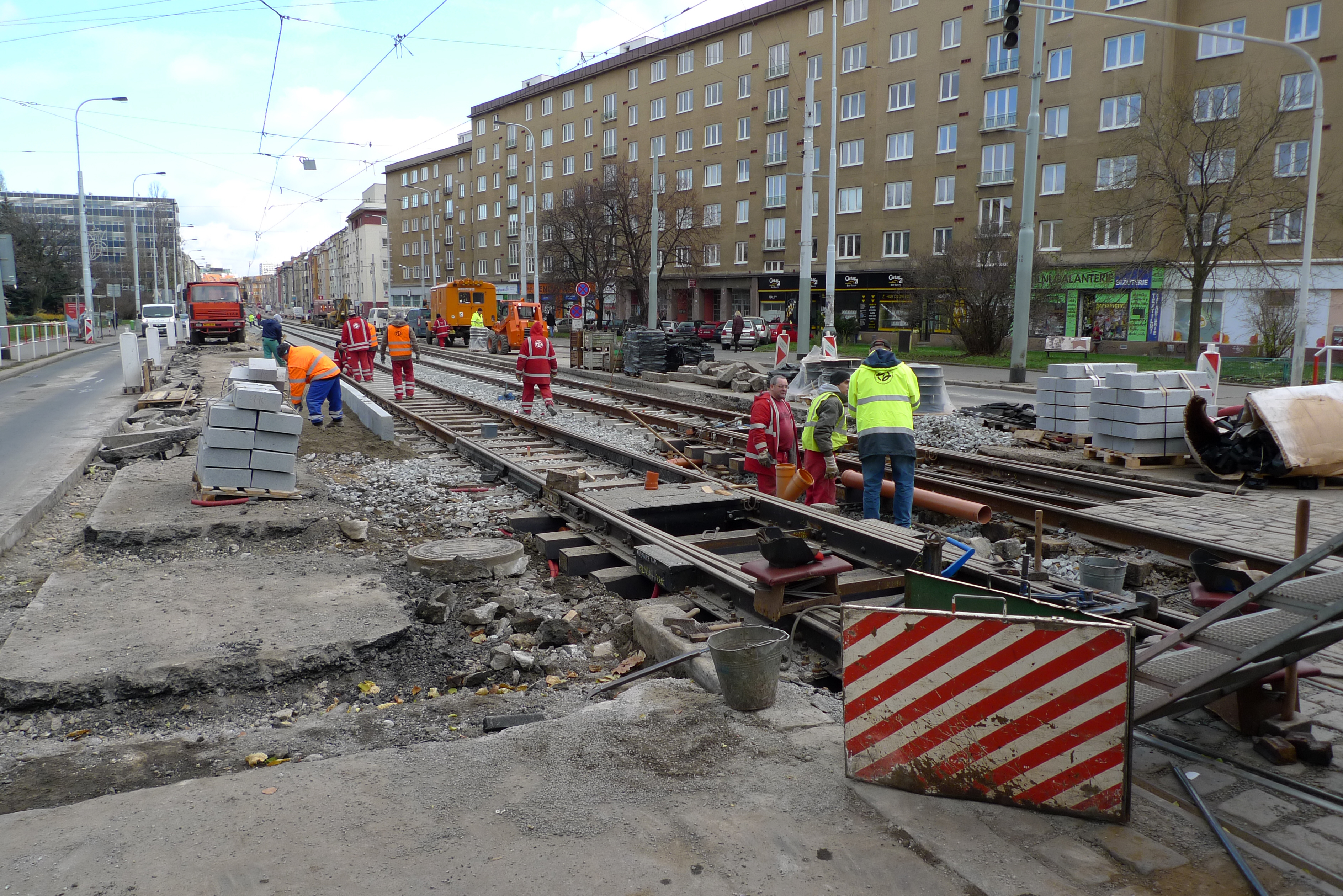 Rekonstrukce tramvajové trati V Olšinách ve Strašnicích v listopadu 2013 - Kubánské náměstí.